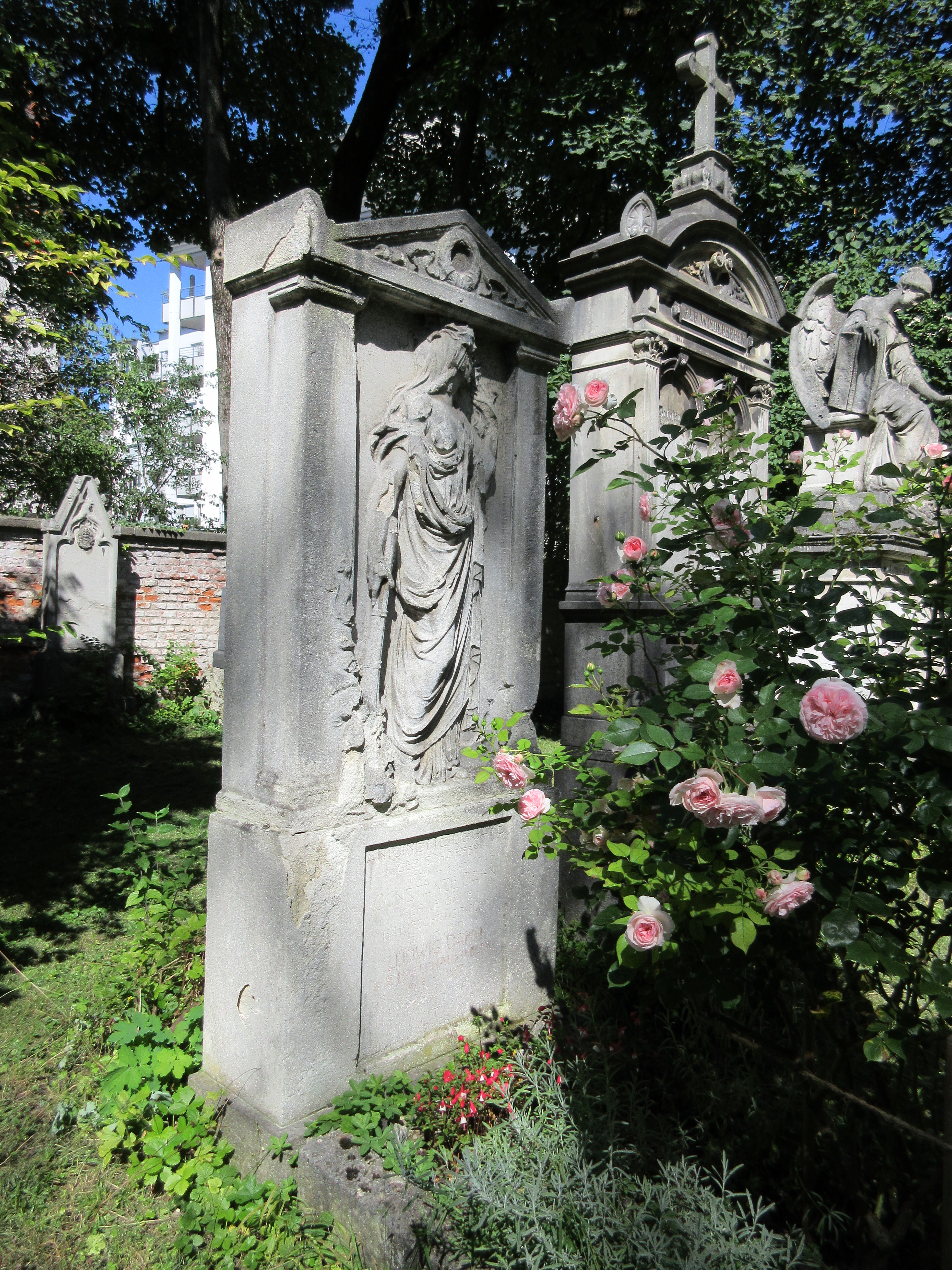 Grab von Friedrich Dahn auf dem Alten Suedlichen Friedhof in Muenchen-Graeberfeld MR-SP 2118